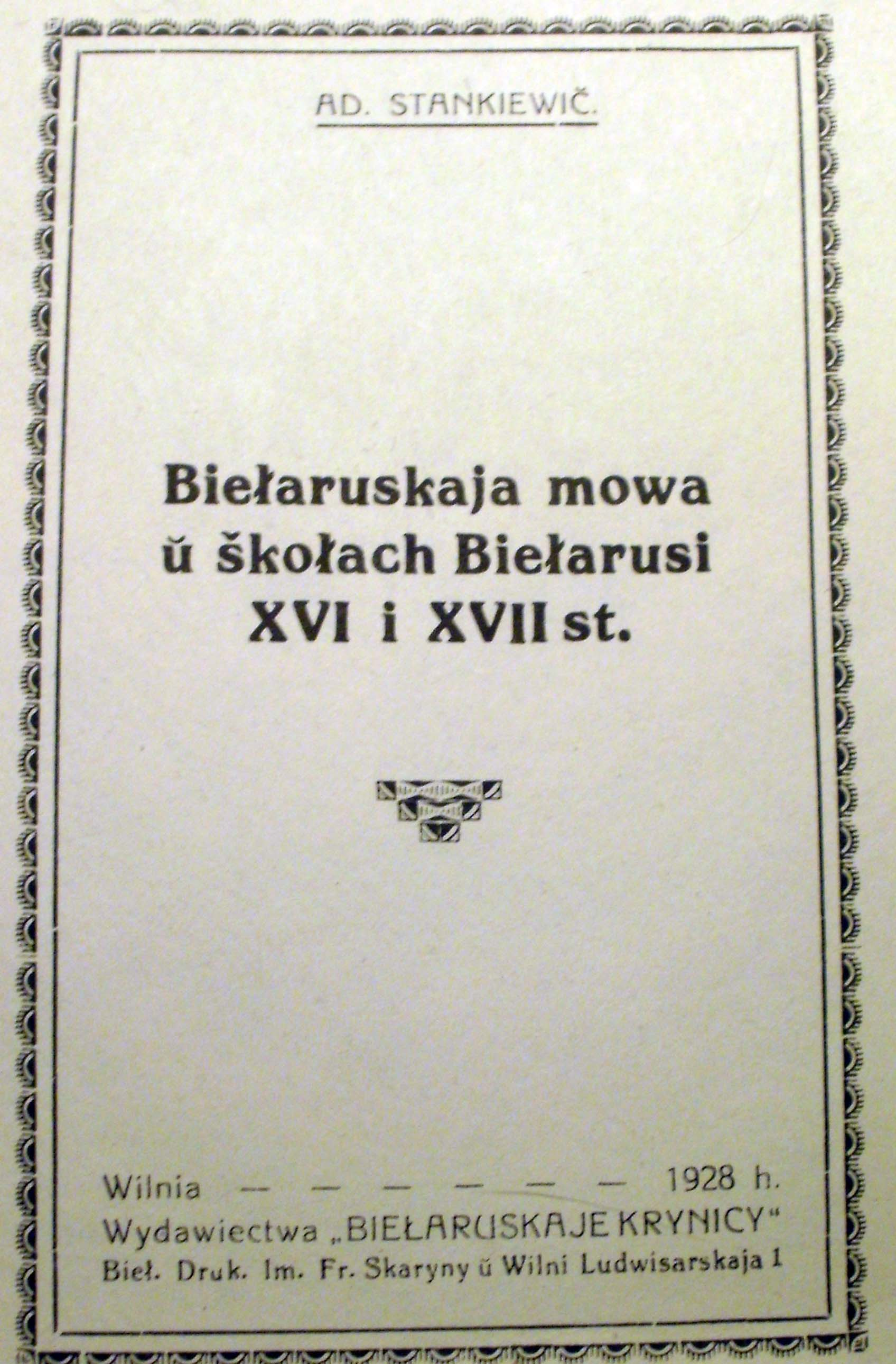 Беларуская (тарашкевіца): Адам Станкевіч - Беларуская мова ў школах Беларусі ў 16-17 ст., Вільня, 1928